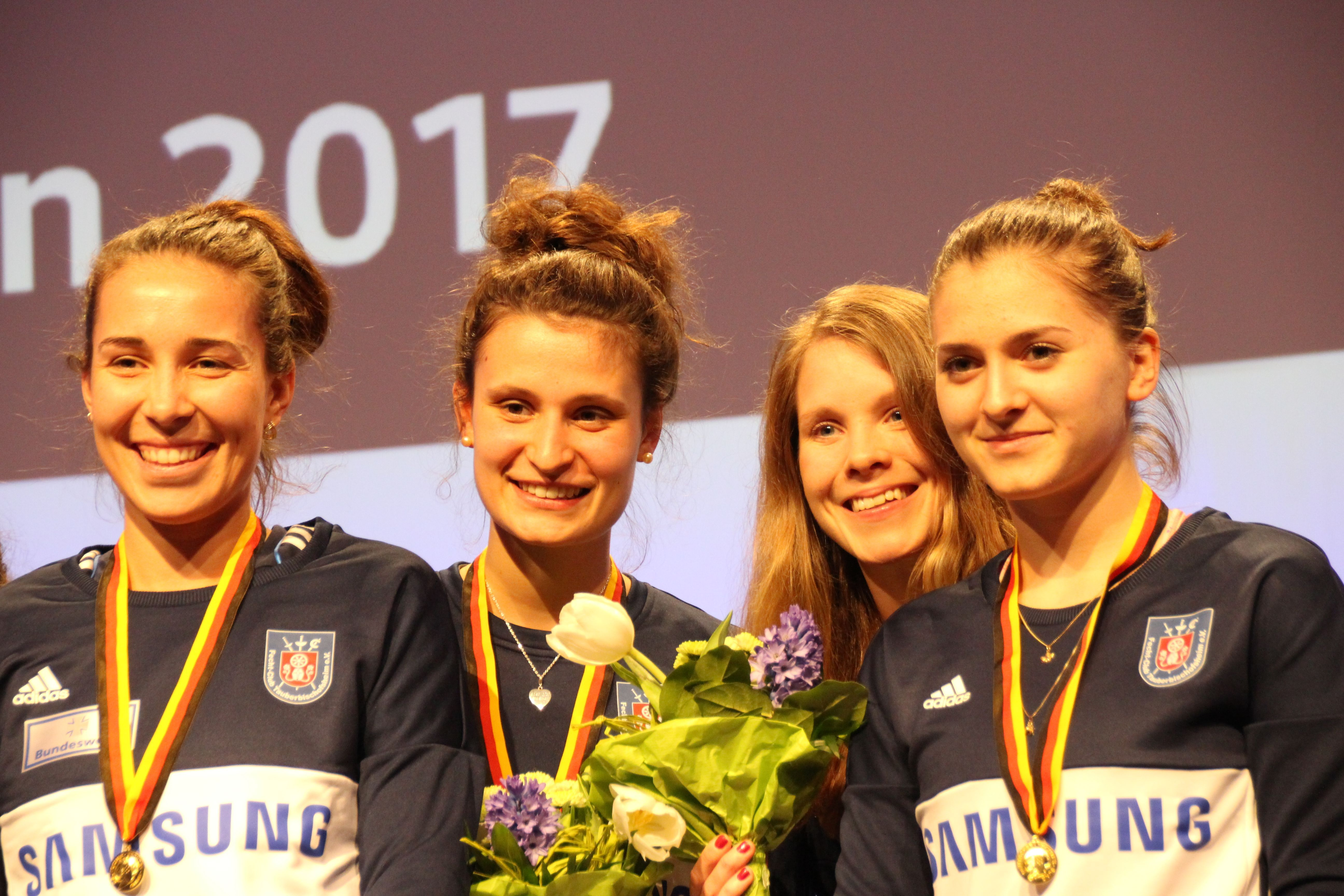 DeuDeutsche Fechtmeisterschaften 2017 im Florett vom 25. bis 26. März 2017 im Olympiastützpunkt Tauberbischofsheim beim Fecht-Club Tauberbischofsheim